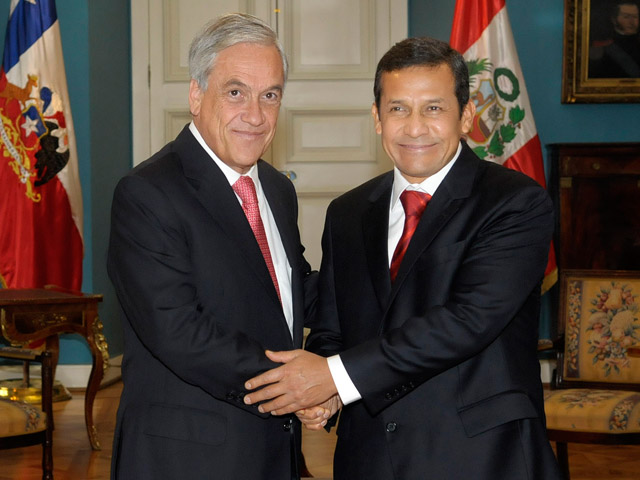 Santiago.- El Presidente de la República, Sebastián Piñera, acompañado del ministro de Relaciones Exteriores, Alfredo Moreno, recibió este mediodía en el Palacio de La Moneda, al Presidente electo del Perú, Ollanta Humala, quien realiza una gira de trabajo por distintos países de América Latina. El futuro Mandatario peruano llegó acompañado de su esposa, Nadine Heredia, y tras su encuentro de trabajo realizarán una declaración a la prensa, para posteriormente almorzar en la sede de Gobierno junto a los principales representantes de los poderes Ejecutivo y Legislativo.